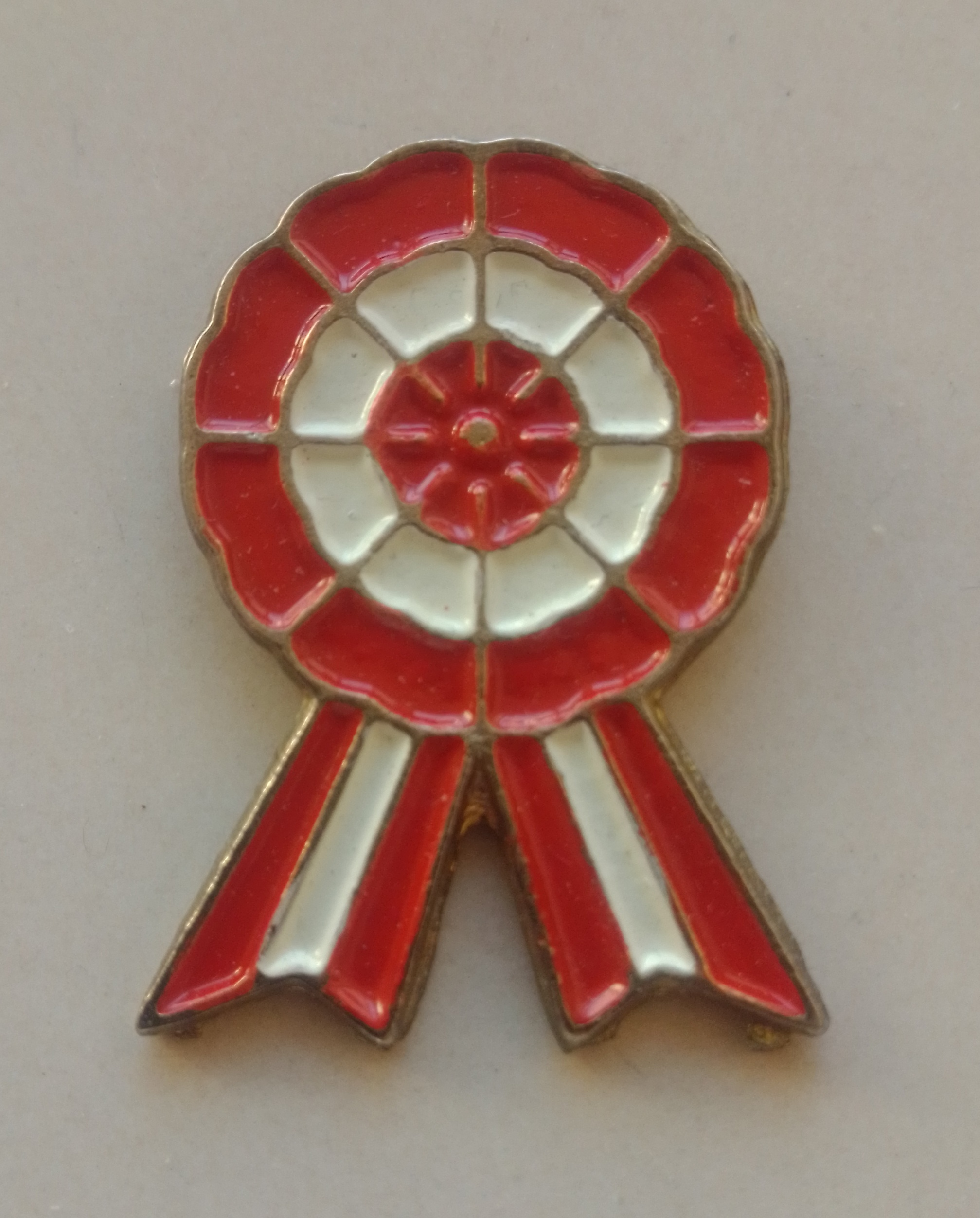 Escarapela del Peru en metal, se usa en julio